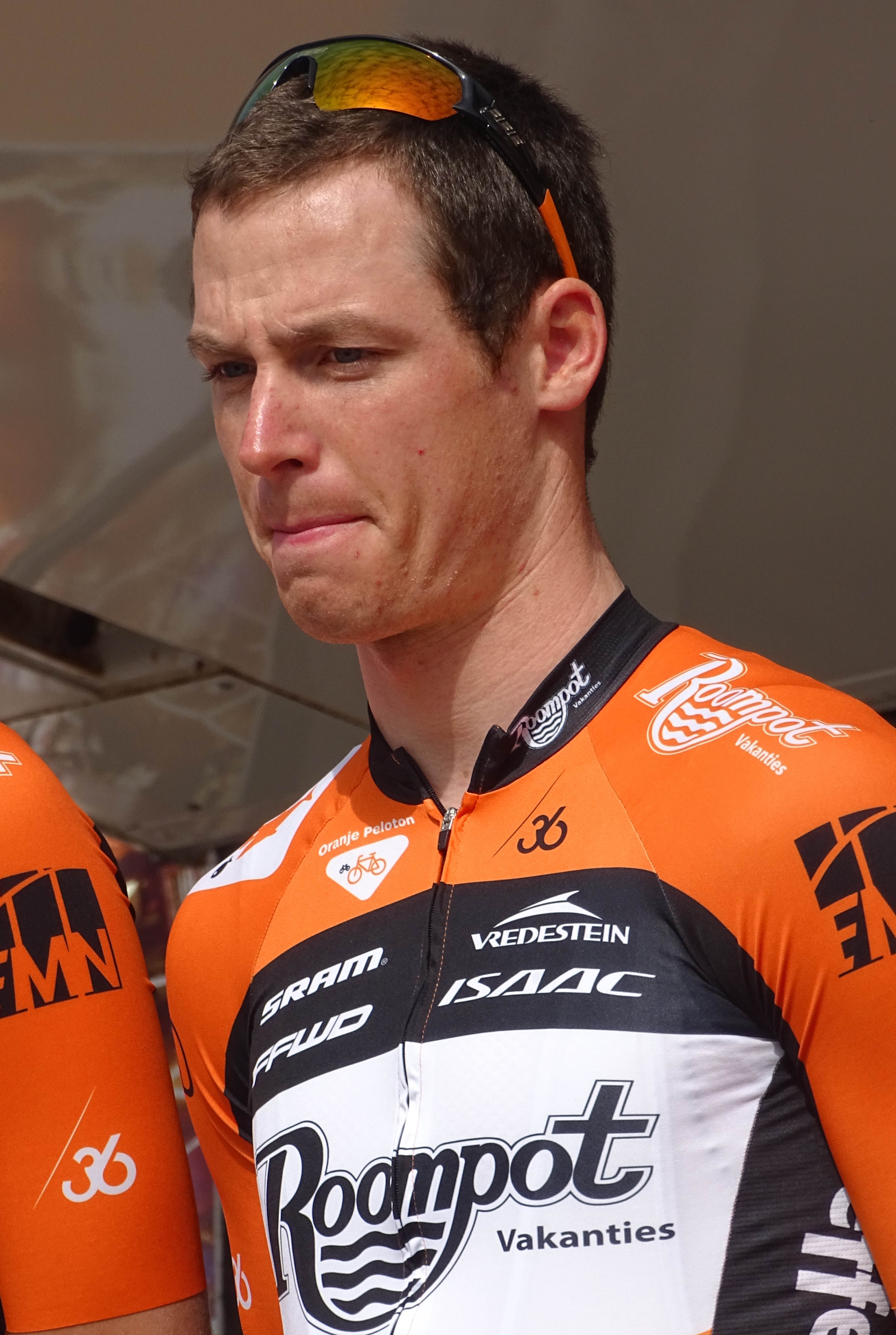 Reportage réalisé le jeudi 16 avril à l'occasion du départ et de l'arrivée du Grand Prix de Denain 2015 à Denain, Nord, Nord-Pas-de-Calais, France.